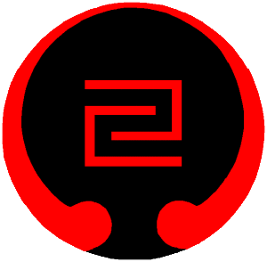 iogkf kenkin